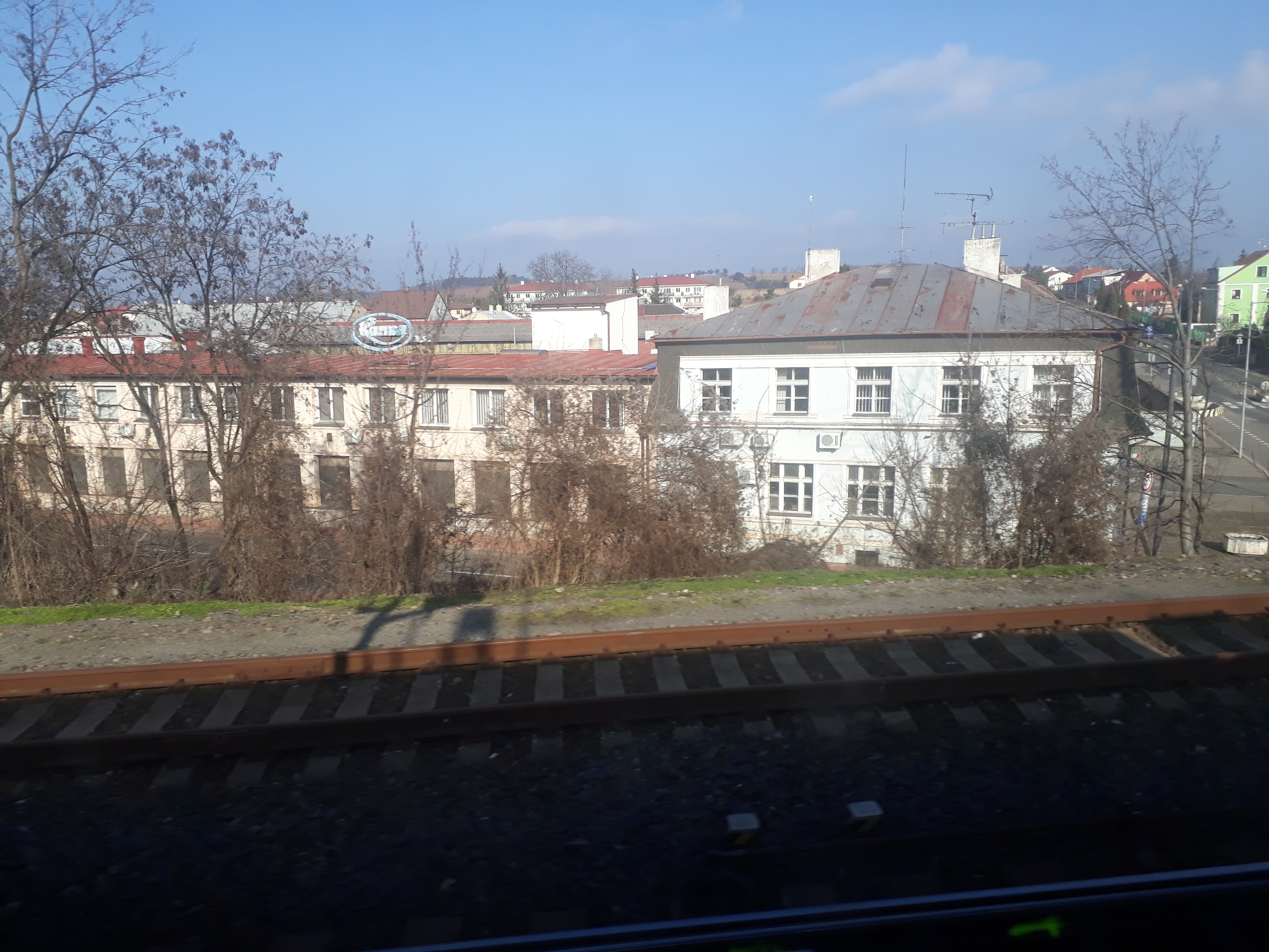 Karma Český Brod - budova továrny. Založeno Karlem Macháčkem.